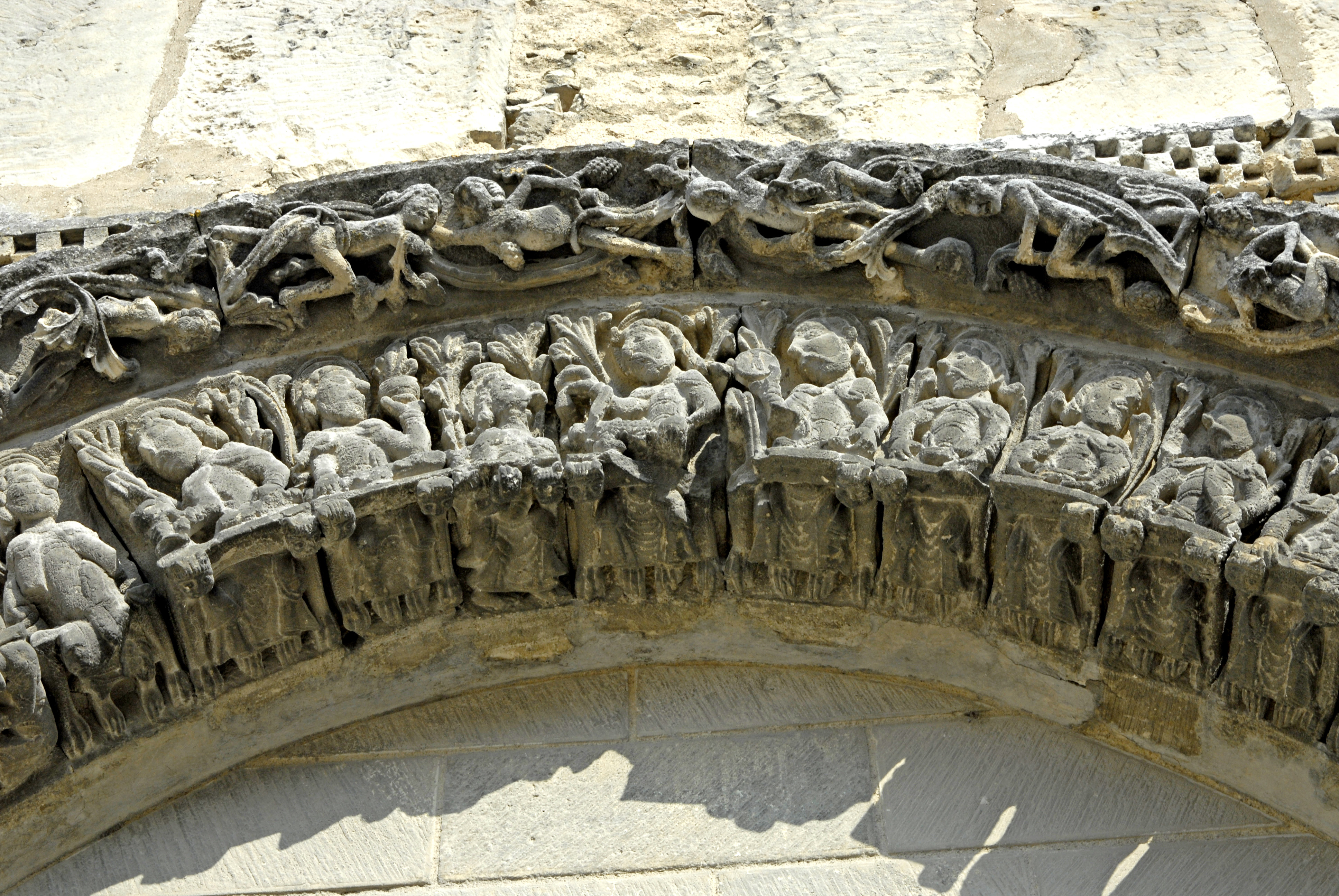 Abbaye aux Dames Saintes, Abteikirche, Archivolten rechtes Scheinportal